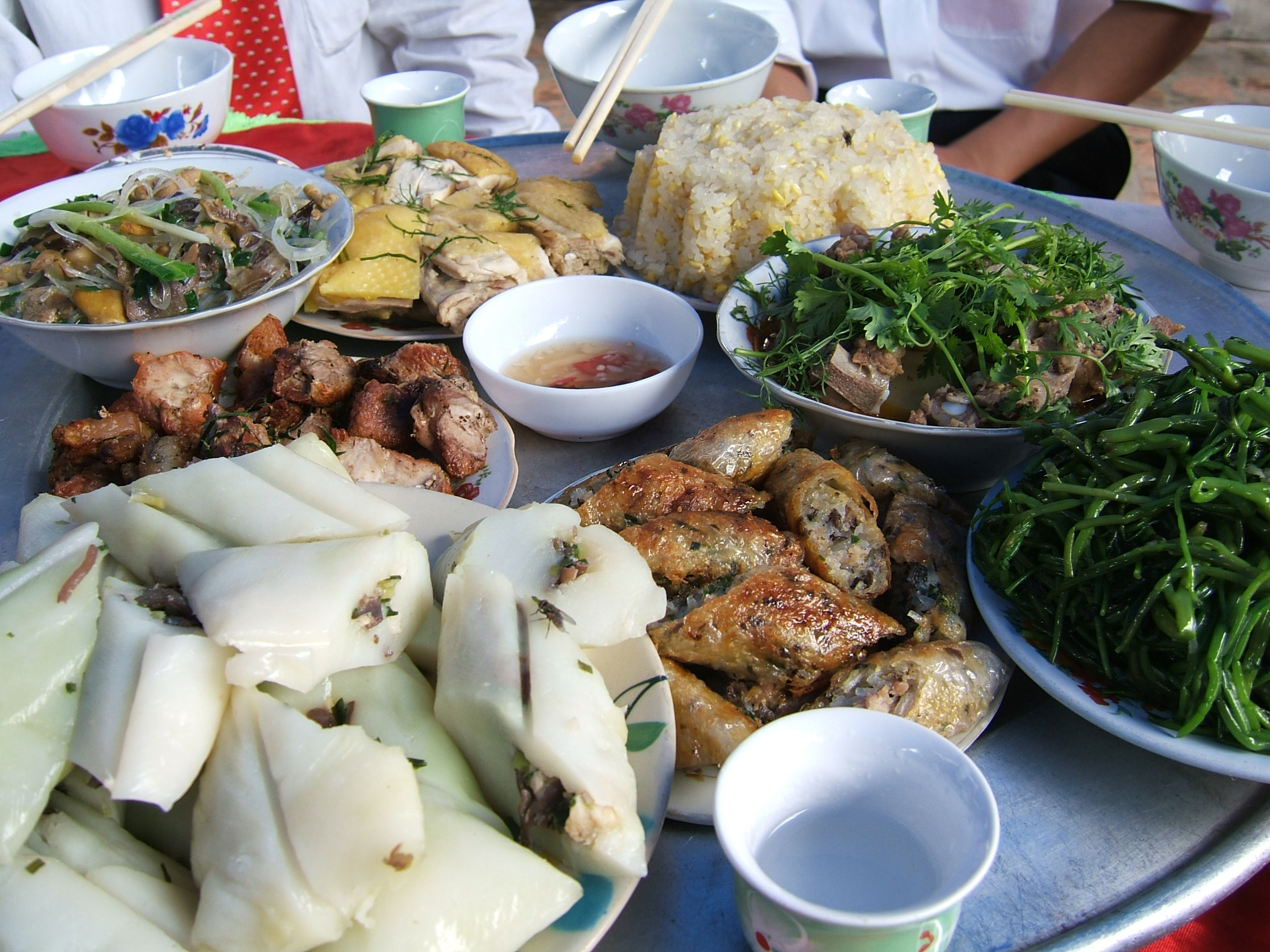 Một mâm cỗ ăn hỏi. Ảnh chụp tại vùng nông thôn cạnh thị xã Sơn Tây, Hà Tây.